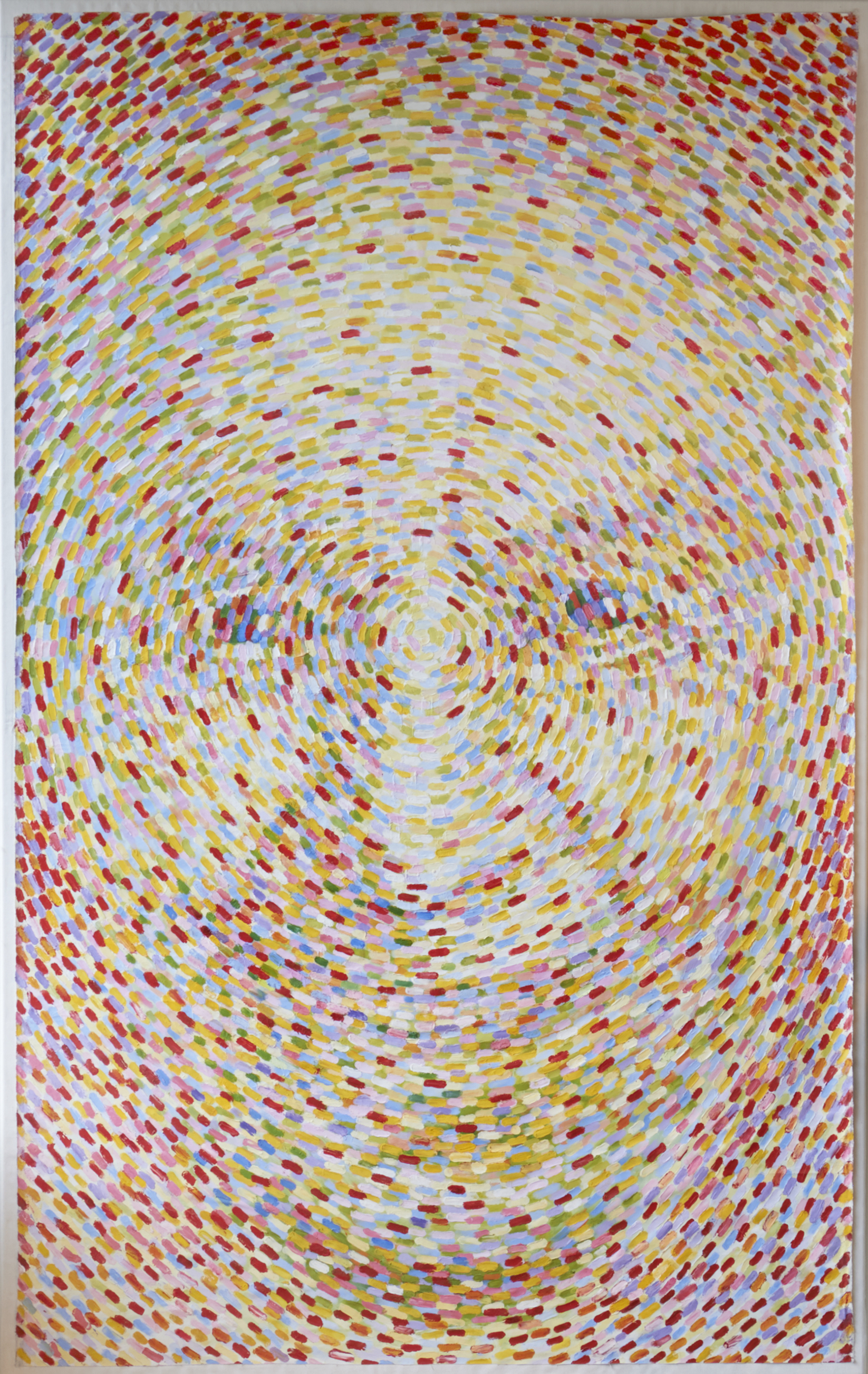 Bild von Andrew James Ward mit Portrait von Elisabeth Pletscher (Öl auf Leinwand, 160 x 240 cm)